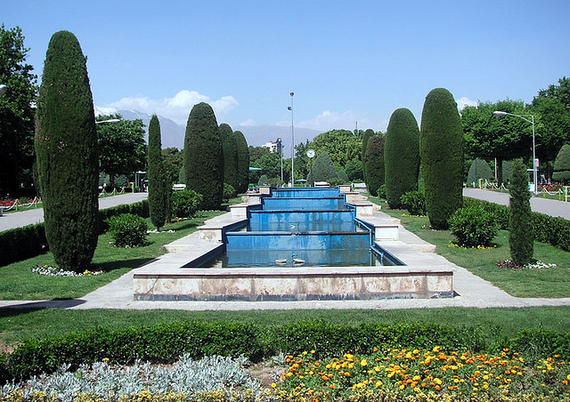 Laleh Park, Tehran